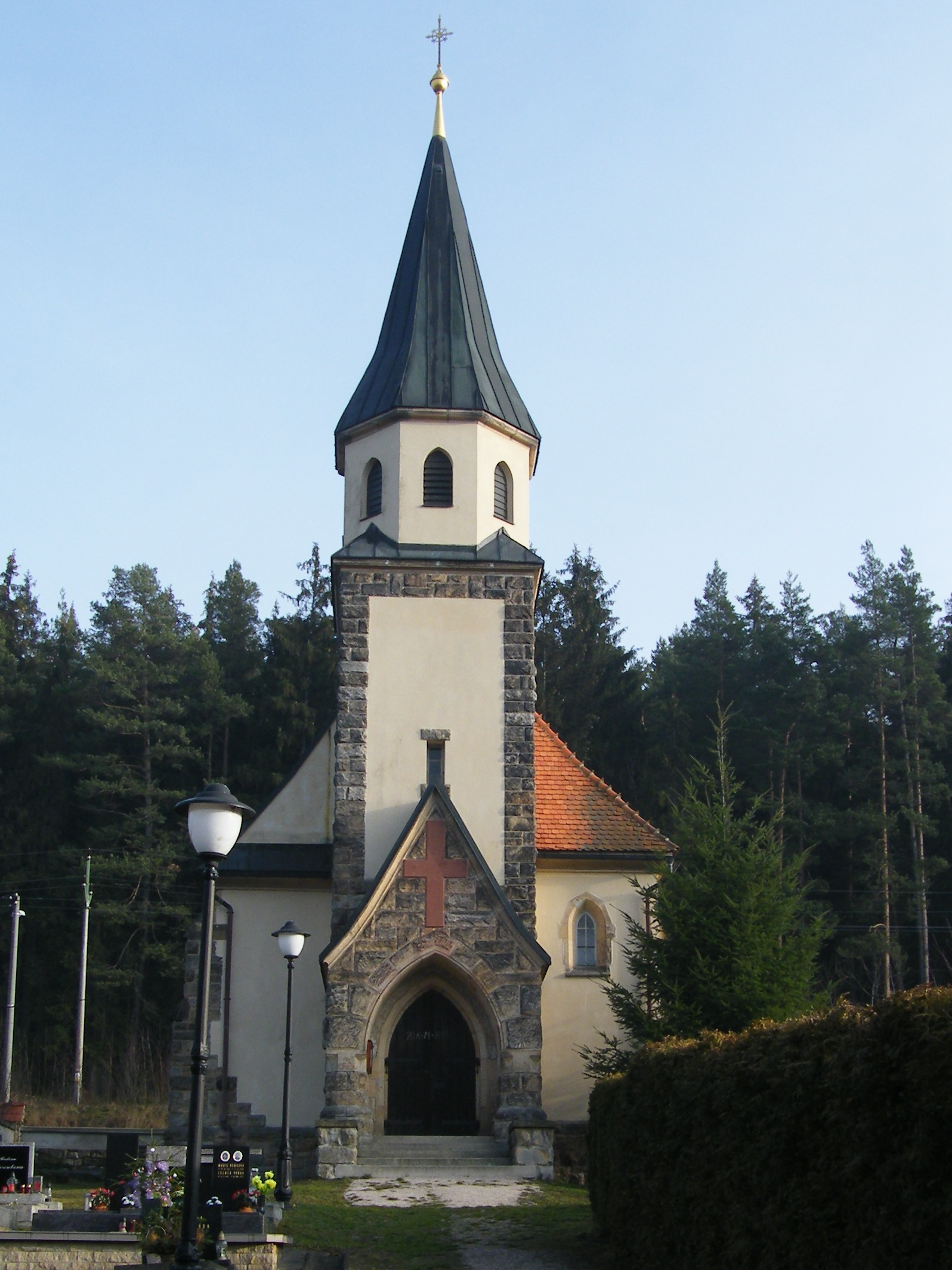 Kostel sv. Anny v Mostku